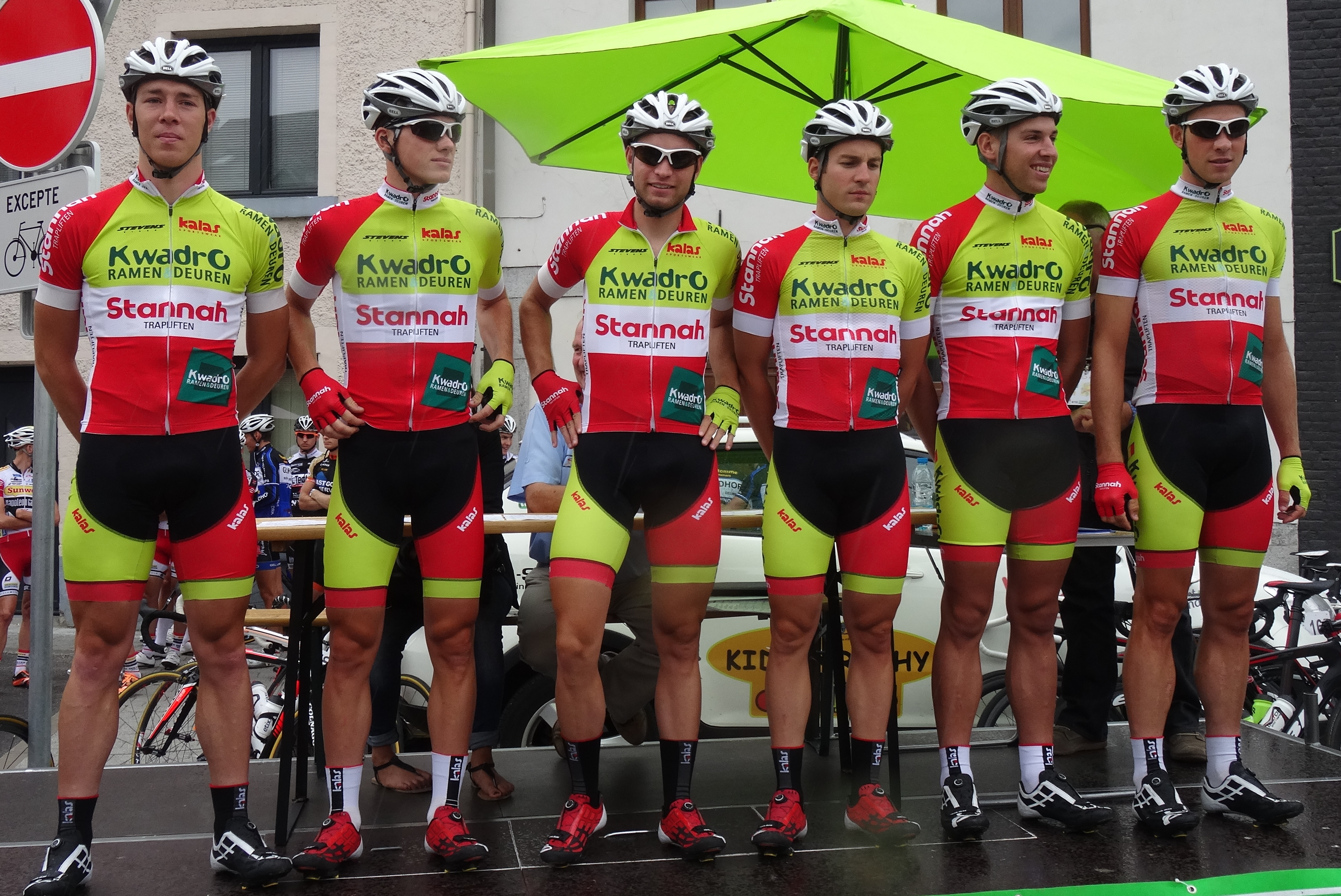 Reportage photographique réalisé le mercredi 6 août à l'occasion du départ de la première étape du Tour de la province de Namur 2014 à Jambes (Namur), Belgique.